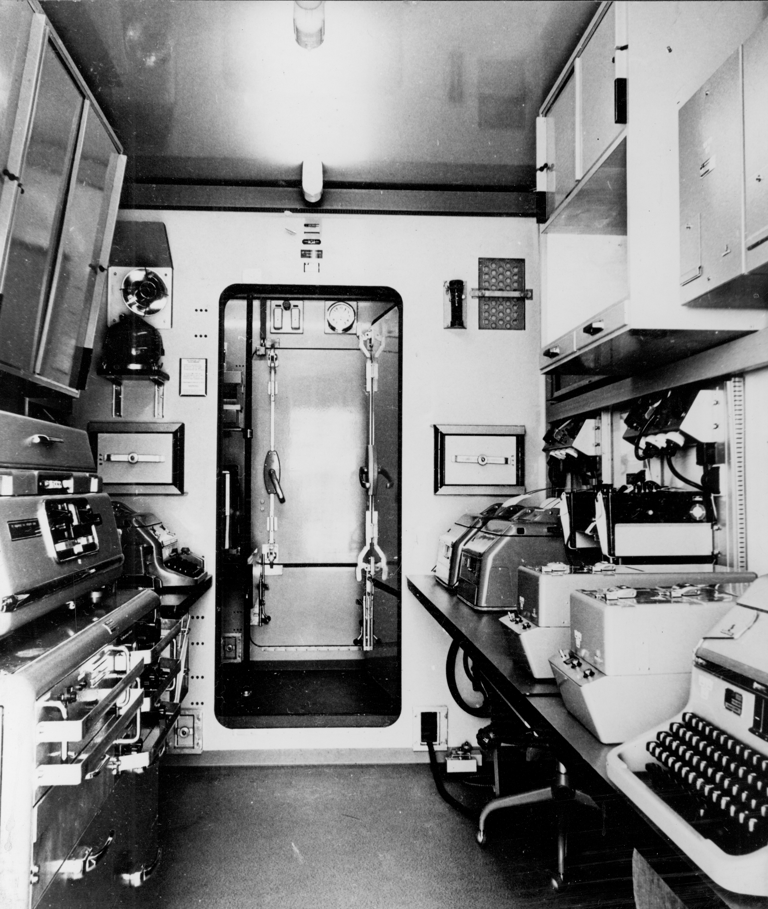 Interiör av signalstationsvagn för Bas-60 i Lopra-systemet (luftoperativa radiosystemet). Försvarets Materielverk utför försök med plasthydda. Interiör av signalstationsvagn, med apparatur.